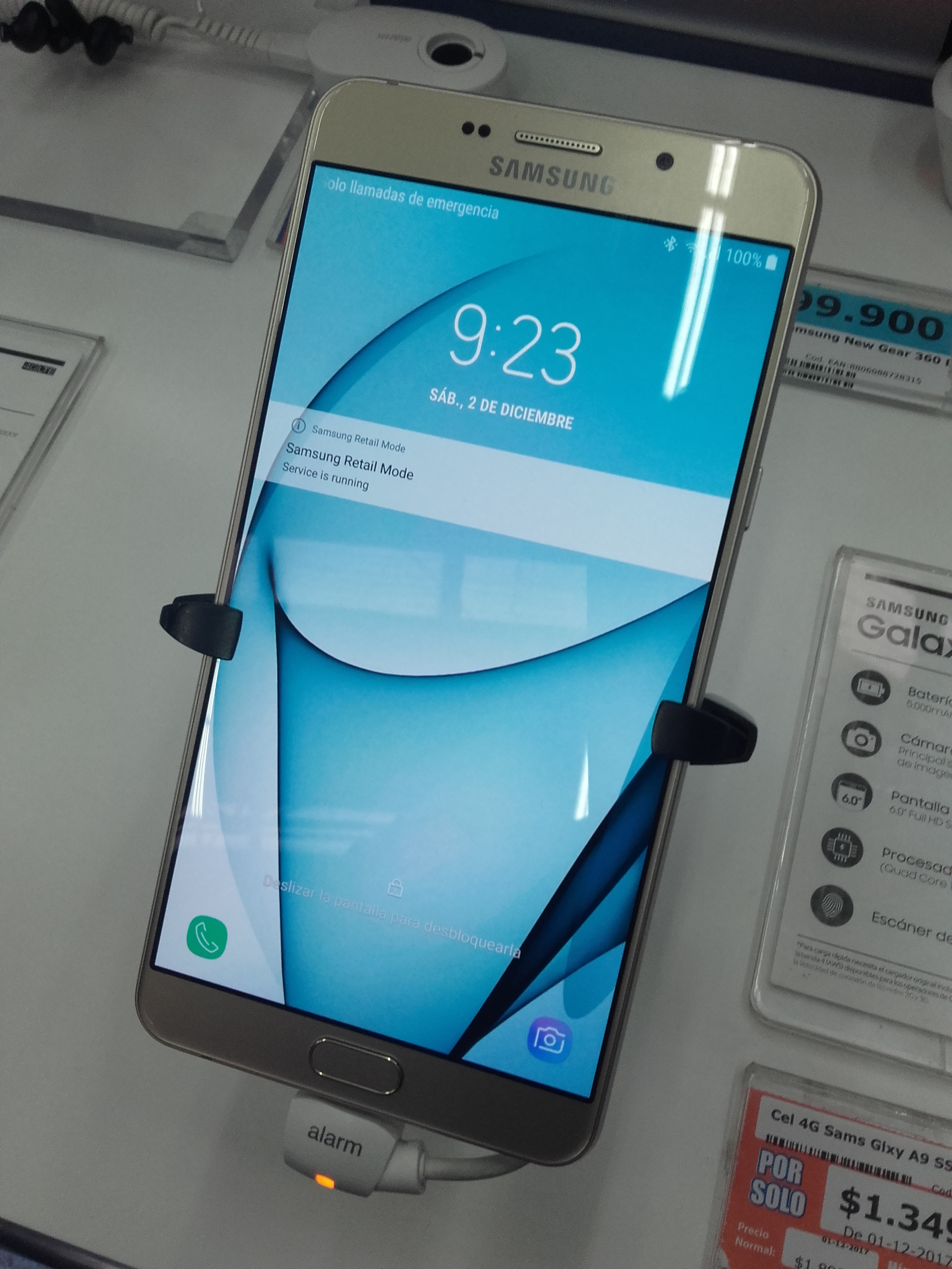 xbdjdddn